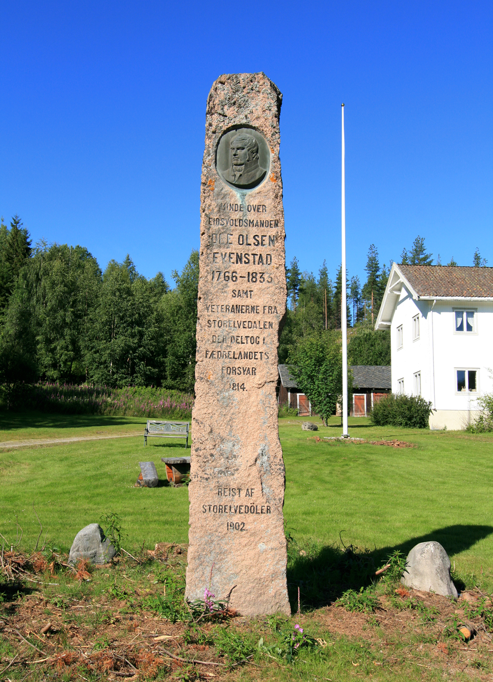 Minnestøtte over eidsvoldsmannen Ole Olsen Evenstad ved Stor-Elvdal kirke.